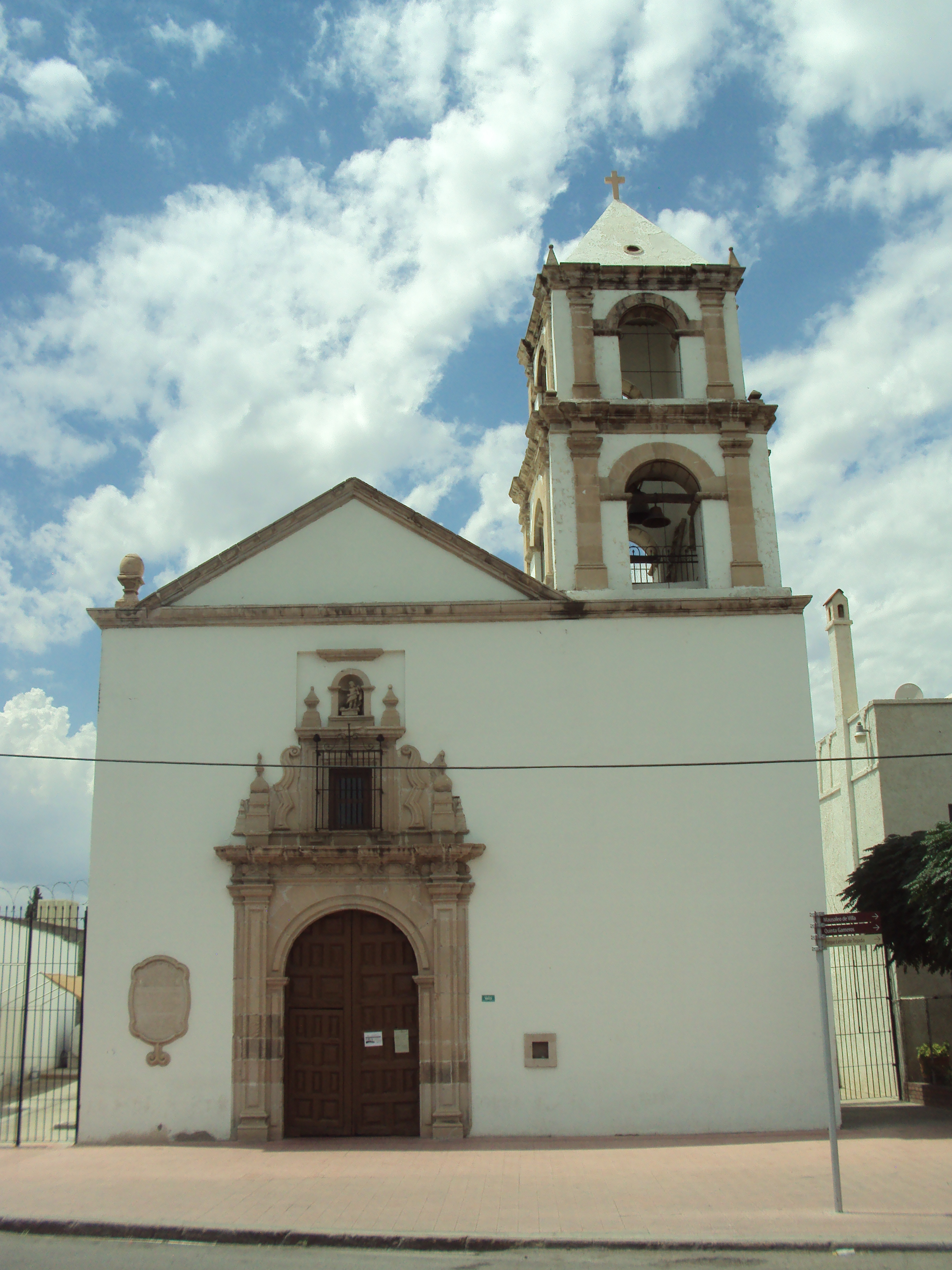 Templo de Santa Rita en la ciudad de Chihuahua, Chihuahua